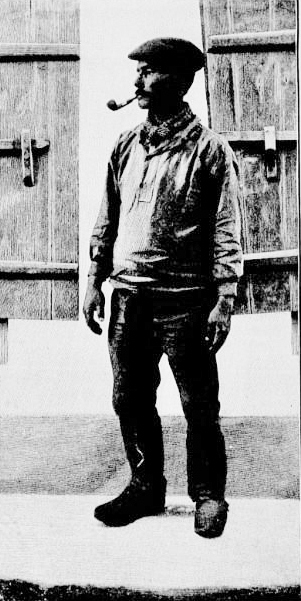 Homme d'Ouessant en 1898 (Photo de Paul Gruyer, Ouessant, Enez Heussa, l'île de l'Epouvante, 1899